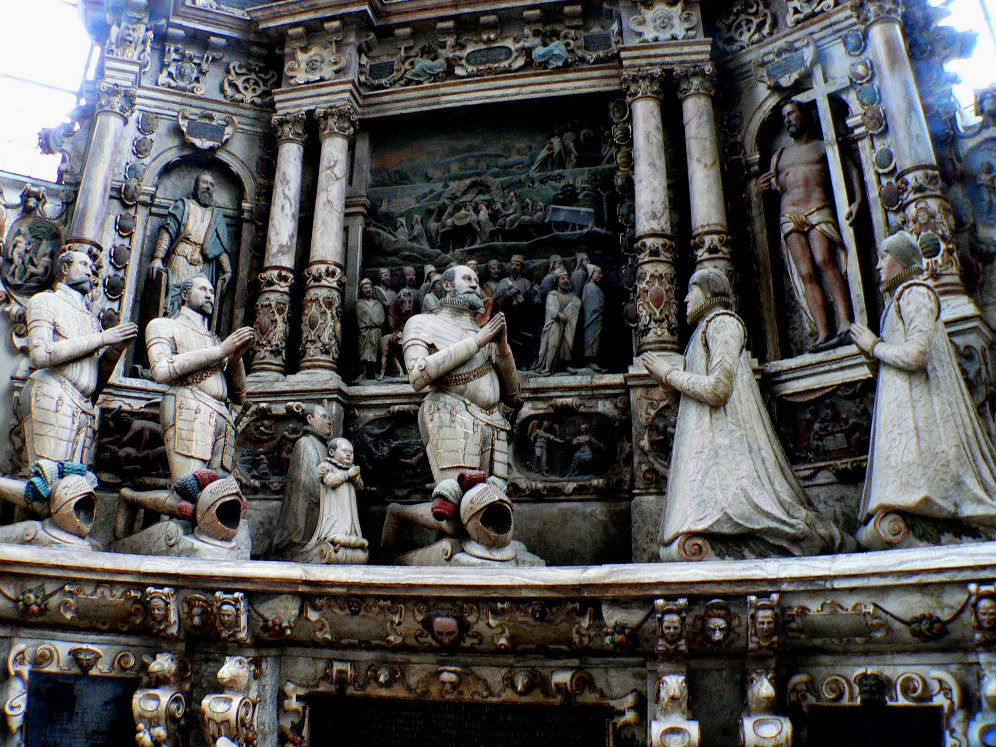 Epitaph in der Morizkirche in Coburg, Bayern